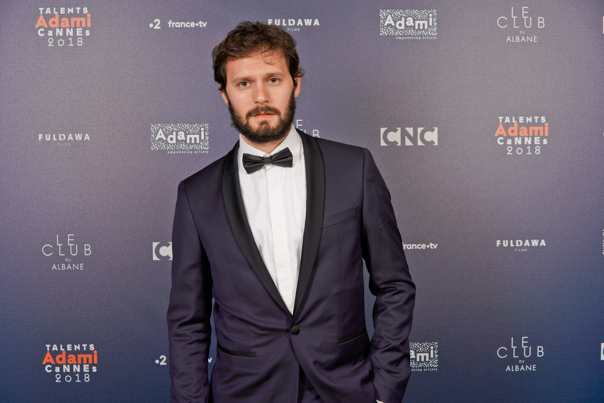 Festival de Cannes 2018 - 25 ans de l'Adami